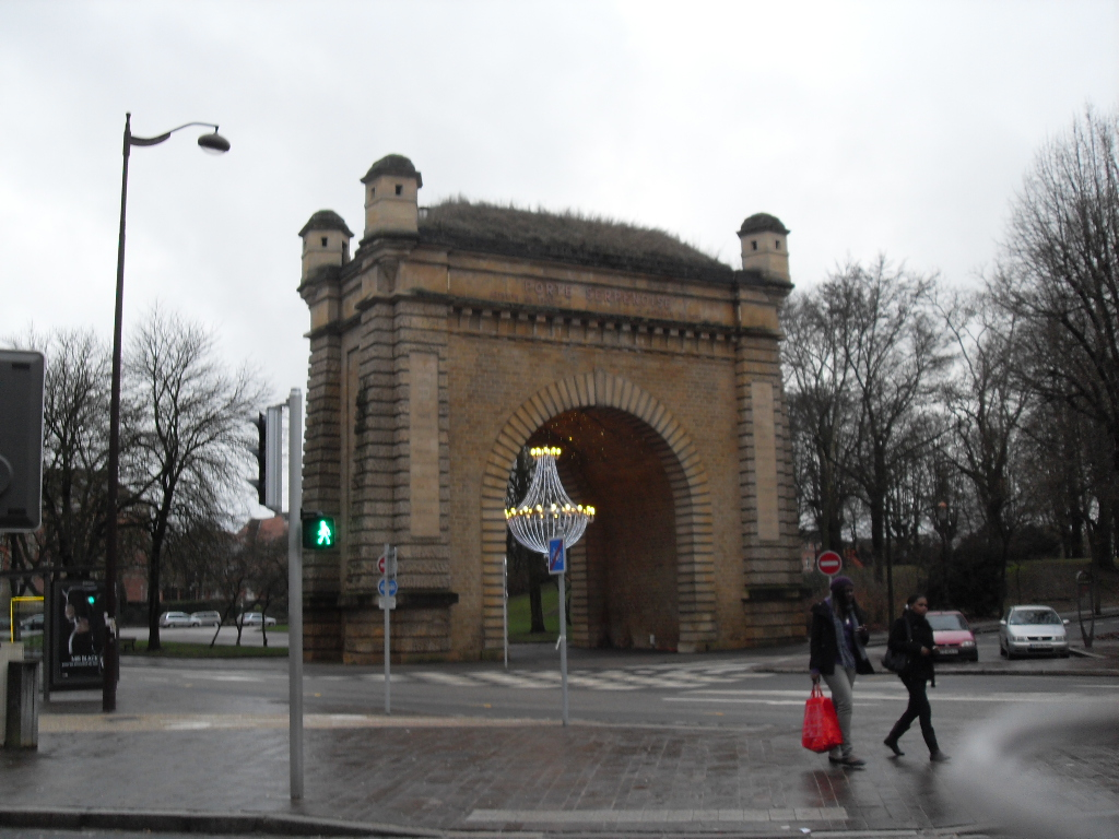 Porte Serpenoise à Metz, Moselle, France.